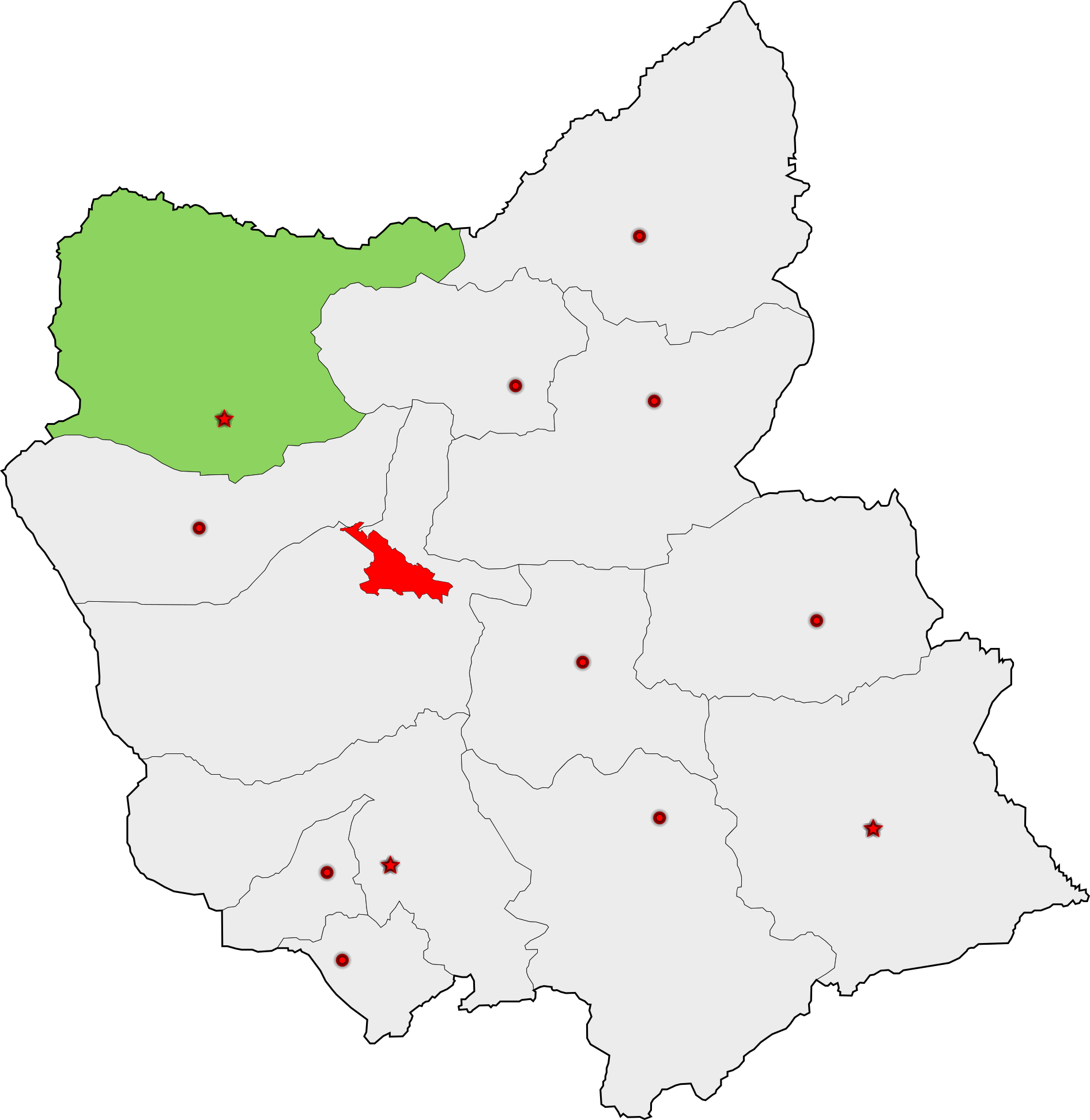 حوزهٔ انتخاباتی مرند و جلفا برای انتخابات مجلس شورای اسلامی